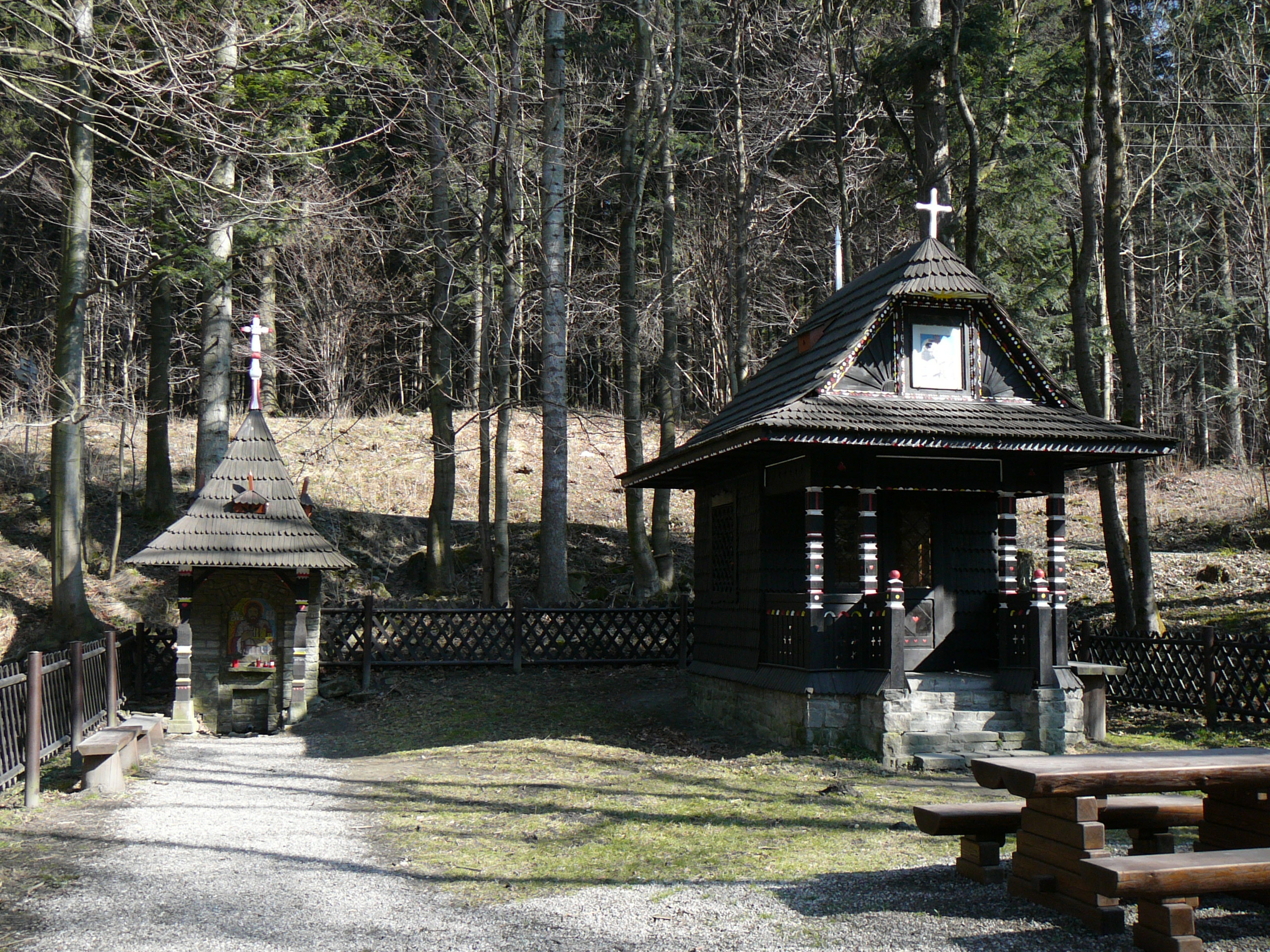 Kaple svatých Cyrila a Metoděje, při prameni Cyrilky, Čeladná.